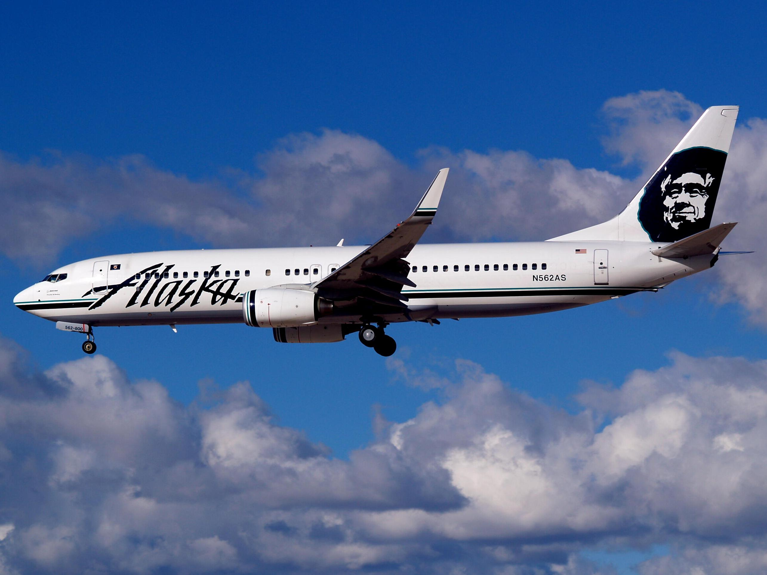 Alaska Airlines Boeing 737-890 N562AS